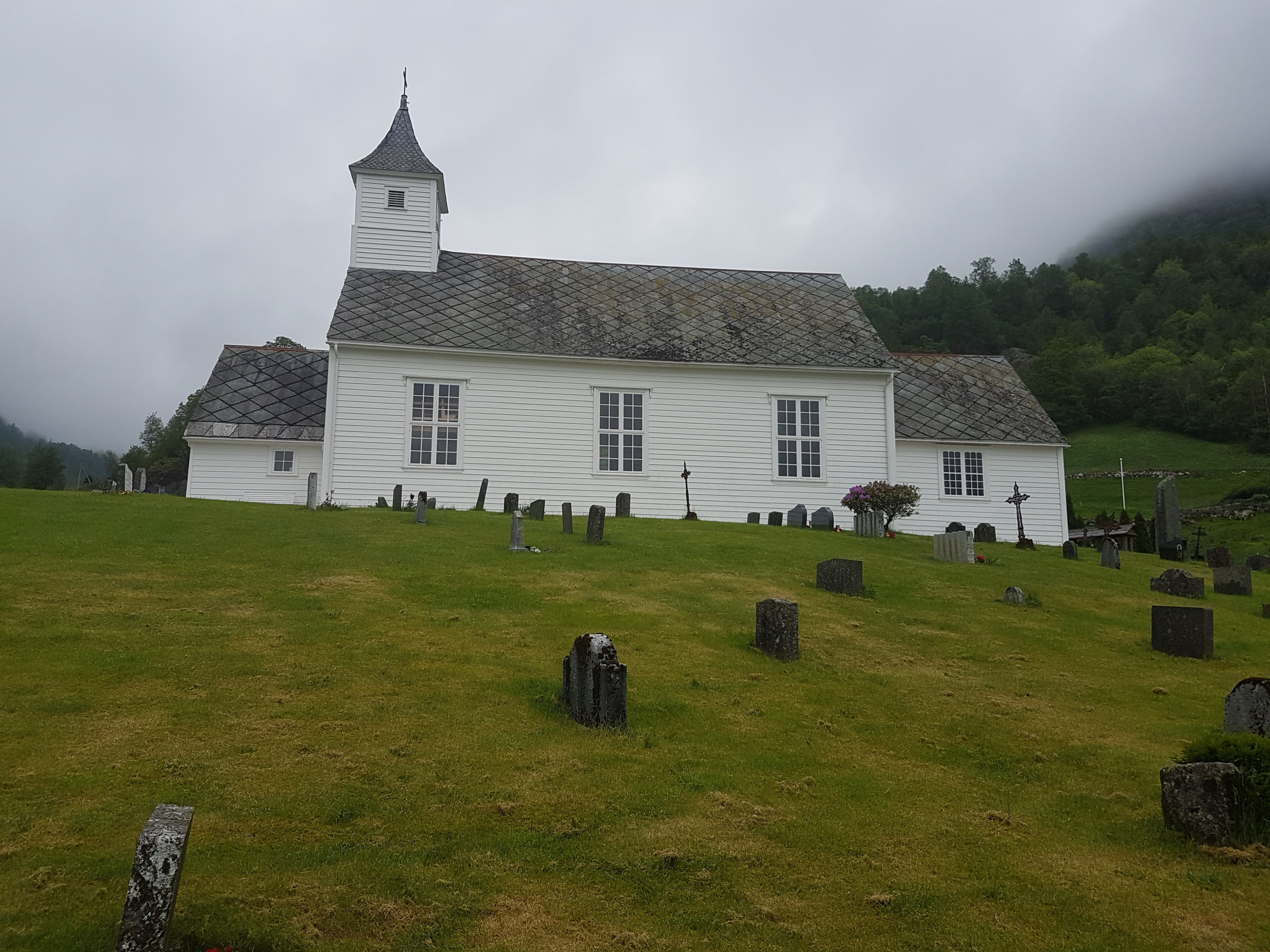 Åkra kirke i Kvinnherad. Foto: Roger Grimelid. Fra Riksantikvarens Kulturminnesøk.